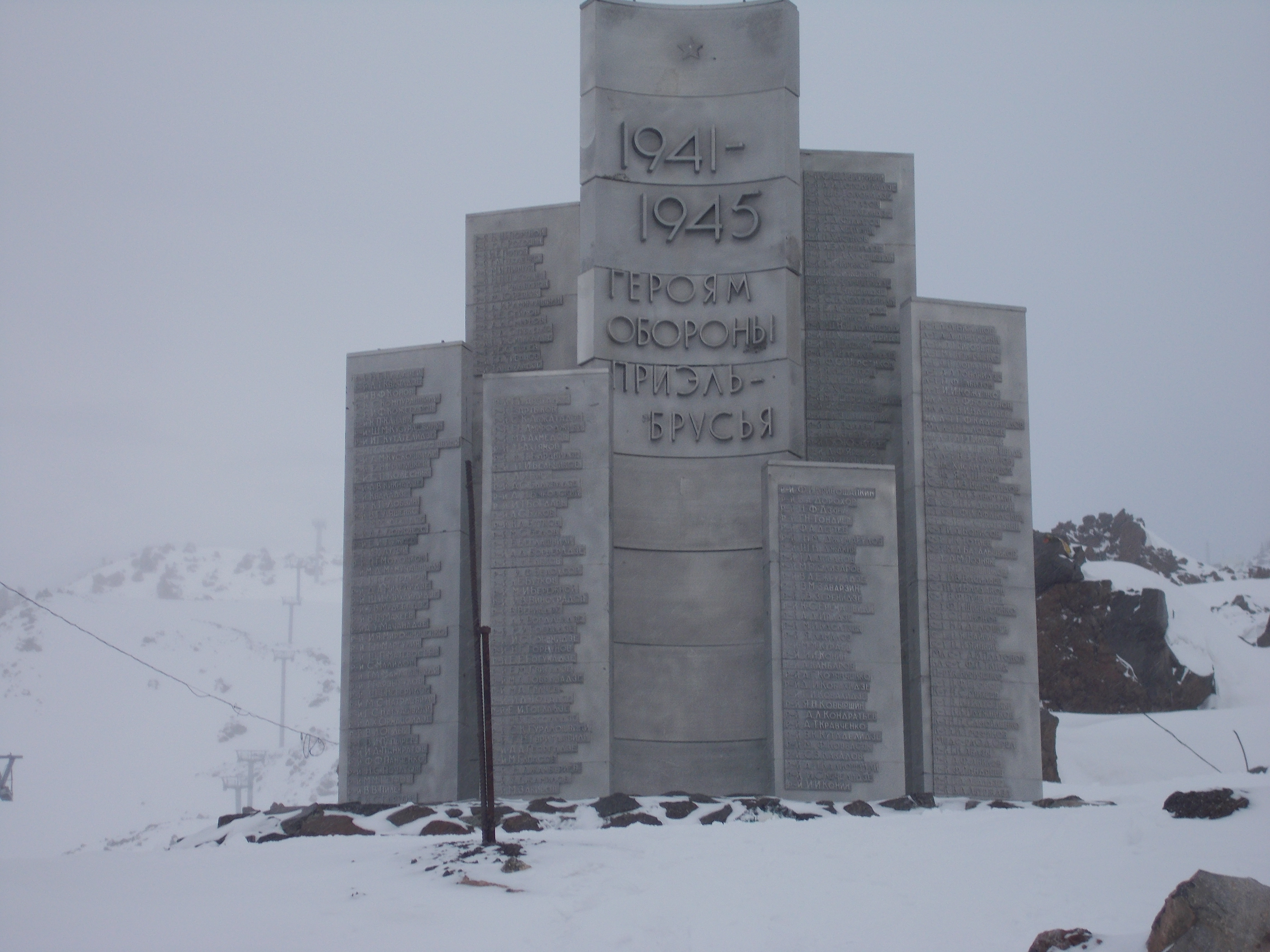 Приэльбрусье, Зольский район This image is related to the protected area of Russia number 0700010